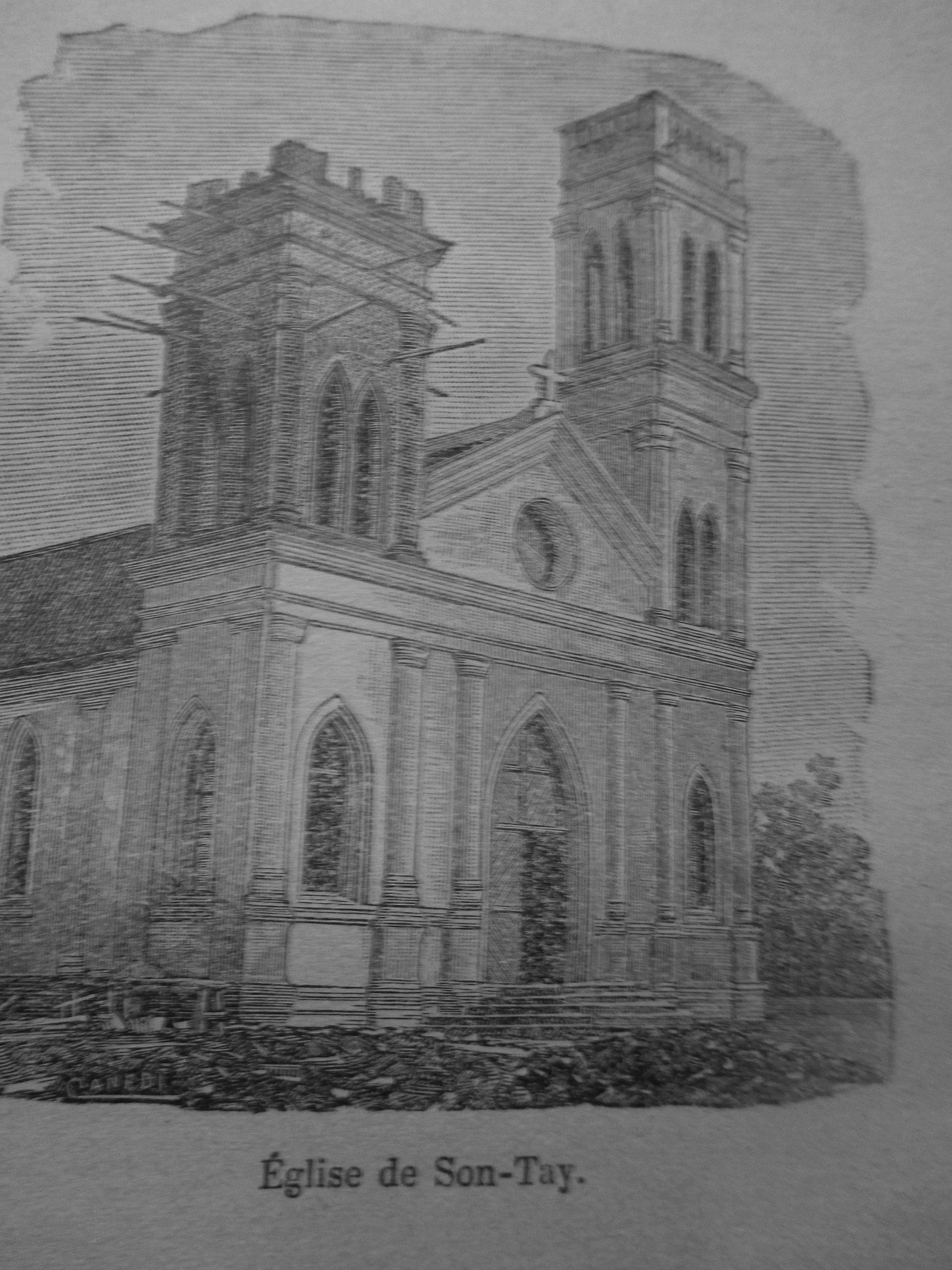 Église de Sontay (Tonkin) en 1884, in Les Missions d'Extrême-Orient, éd. Mame, Tours, 1900, p. 137